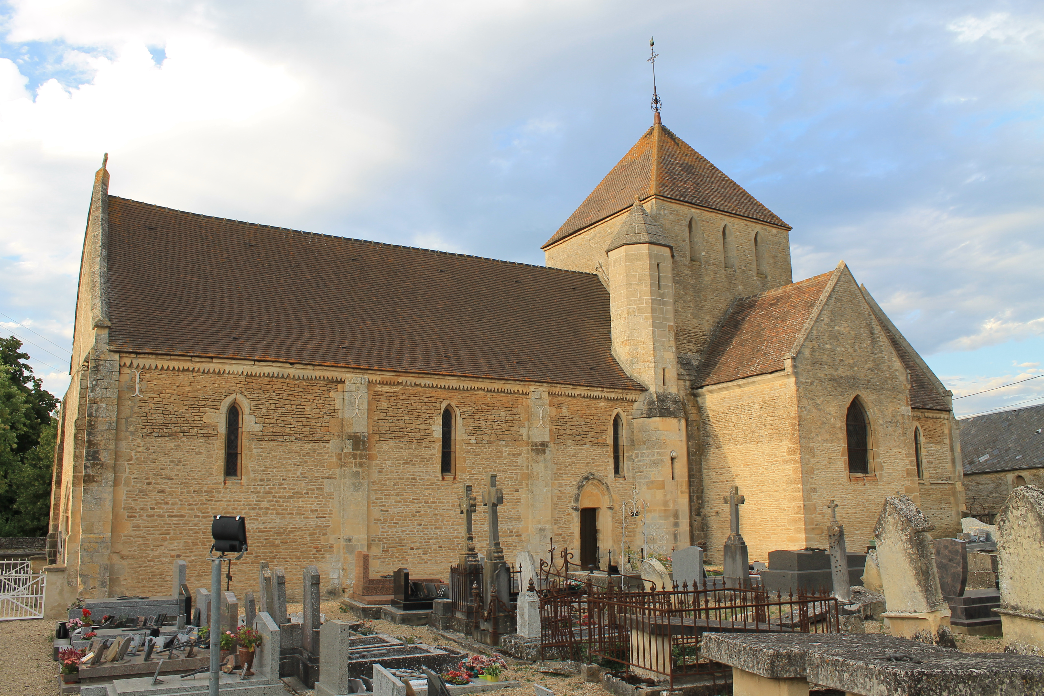 Façade sud de l'église Saint-Gervais de Percy-en-Auge (Calvados)